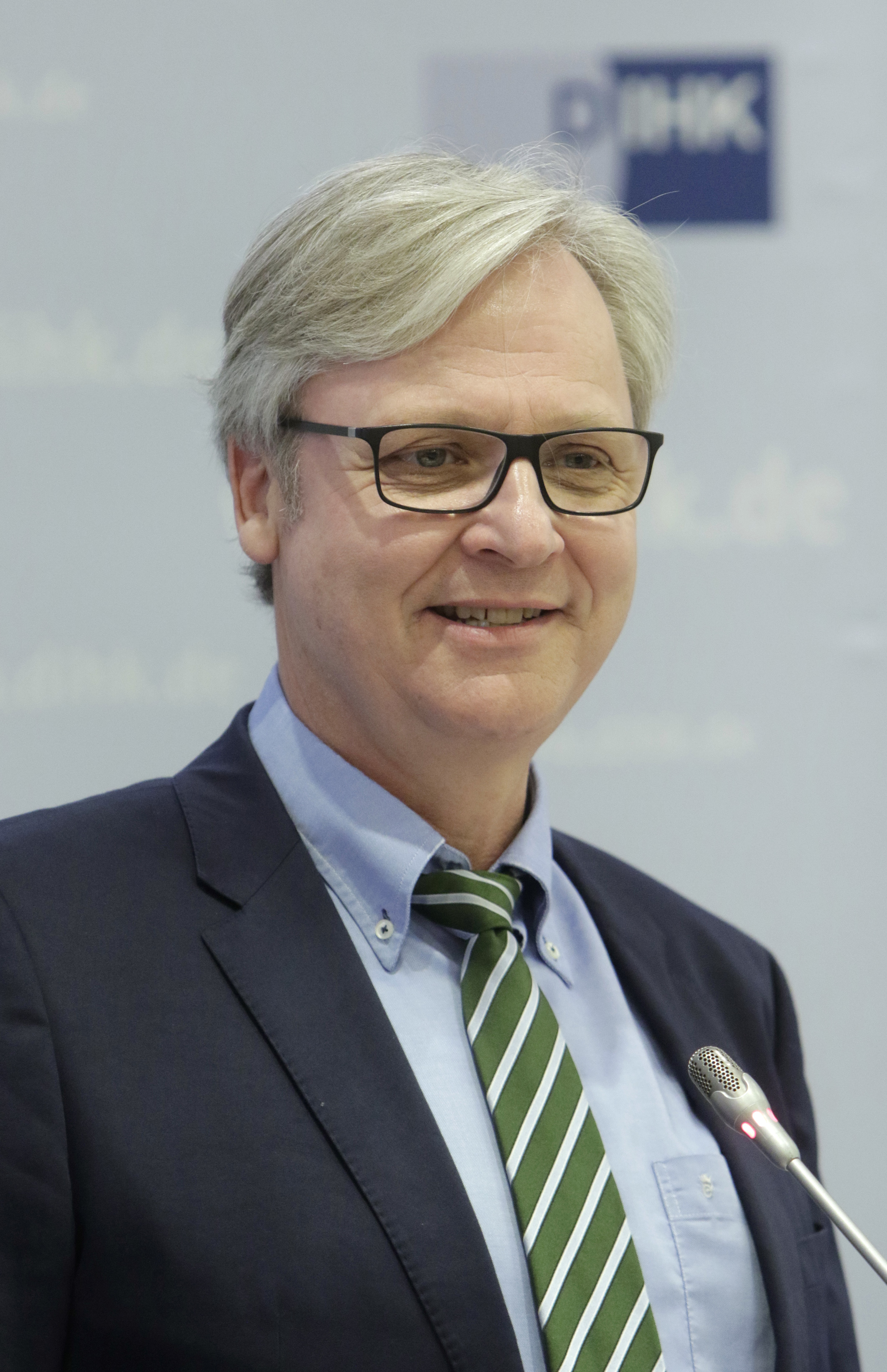 DIHK-Hauptgeschäftsführer Dr. Martin Wansleben bei der Vorstellung der DIHK-Konjunkturumfrage im Haus der deutschen Wirtschaft